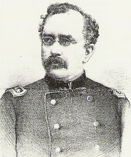 Gottlieb Ott (1832-1882) Heinrich Richard Schmidt (Hg.), Worber Geschichte, Bern 2005, S. 604